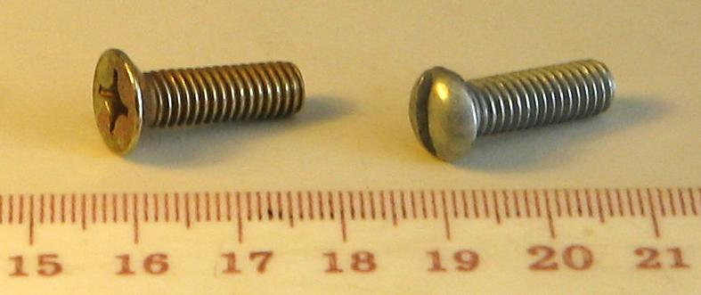 Ŝraŭboj kun ŝraŭbeco M6, kun diversaj kapoj. Mi, aŭtoro de la bildo, permesas al ĉiuj uzi ĝin kun ĉi tiaj kondiĉoj